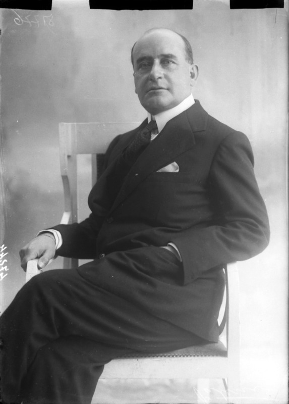 Gaetano Paternò di Manchi di Bilici, marchese e ambasciatore